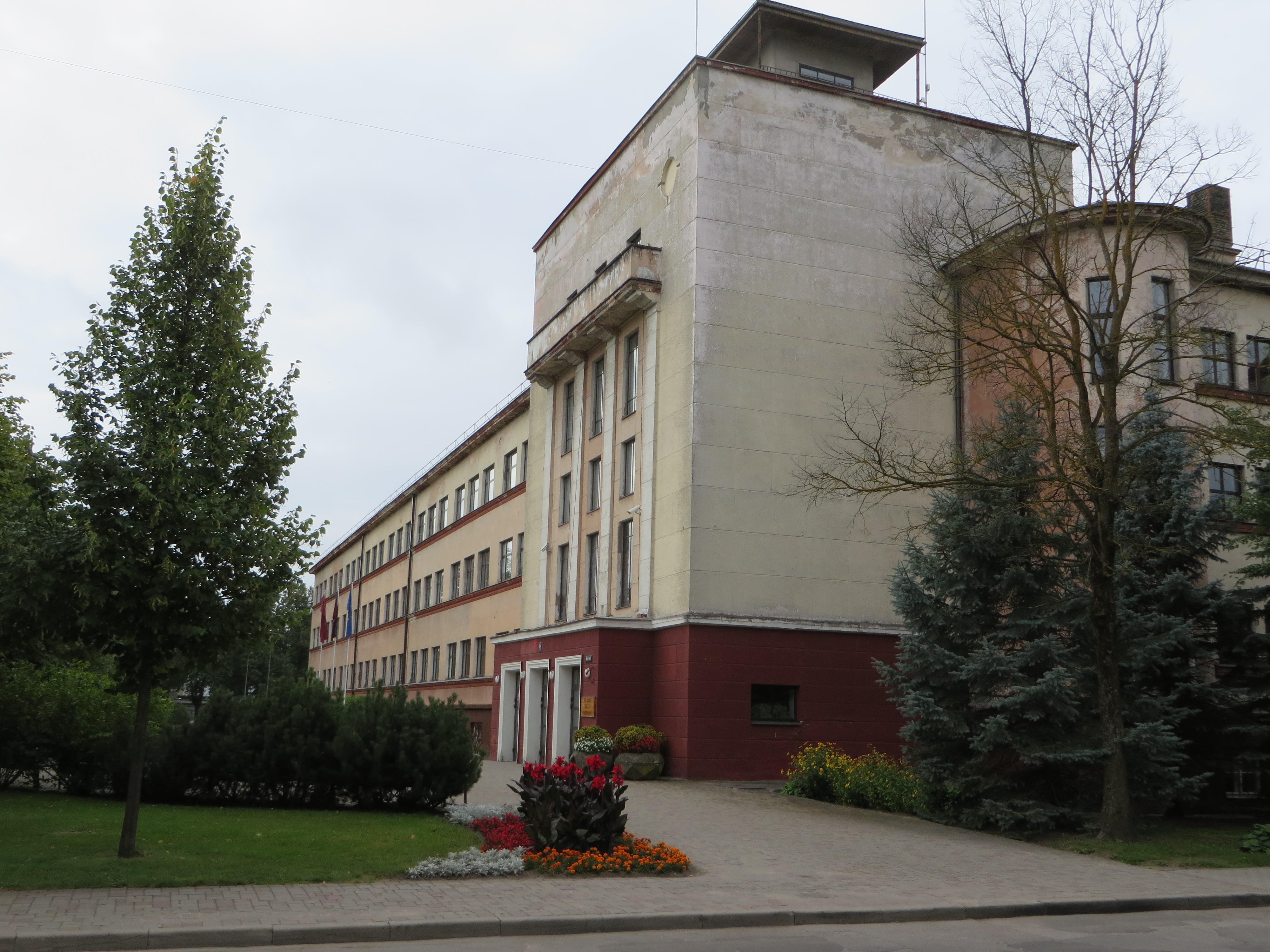 Skola, Jelgava, Mātera iela 44